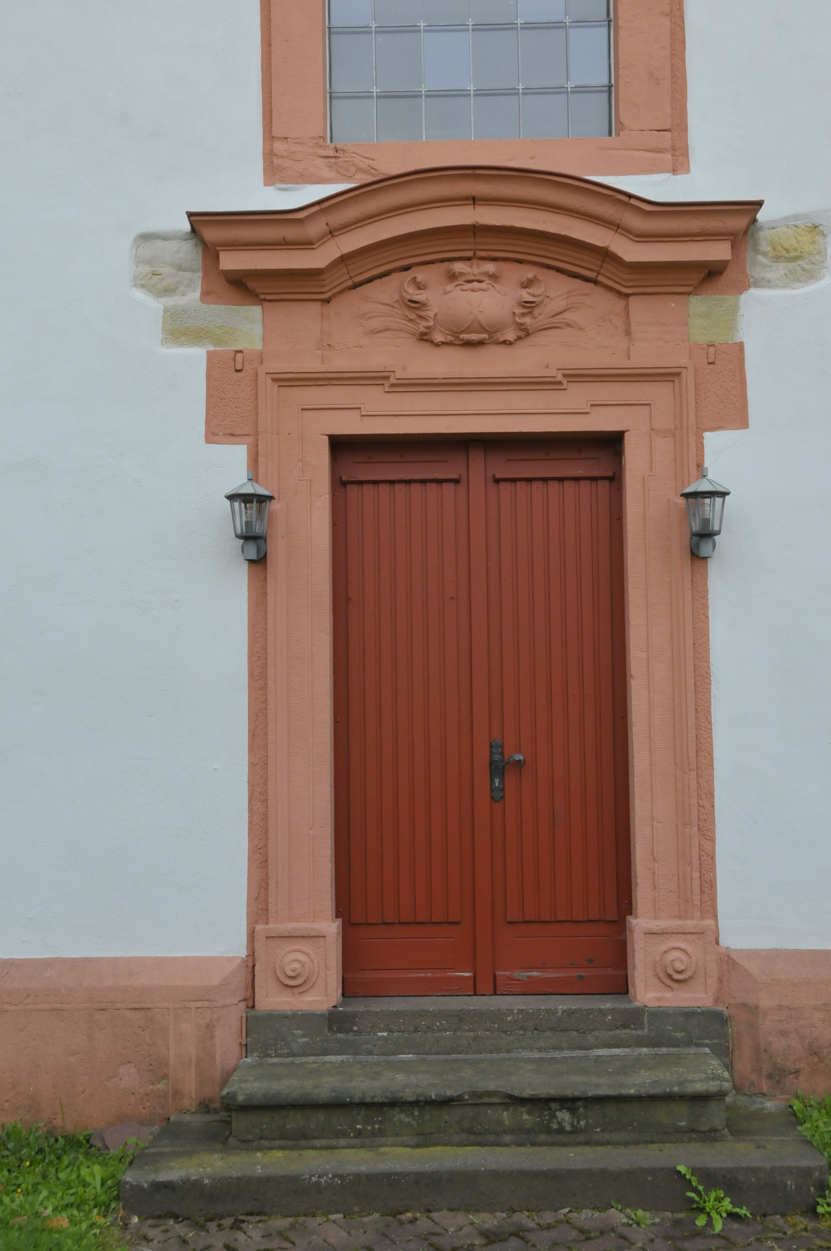 Finsterbergen, Kirche